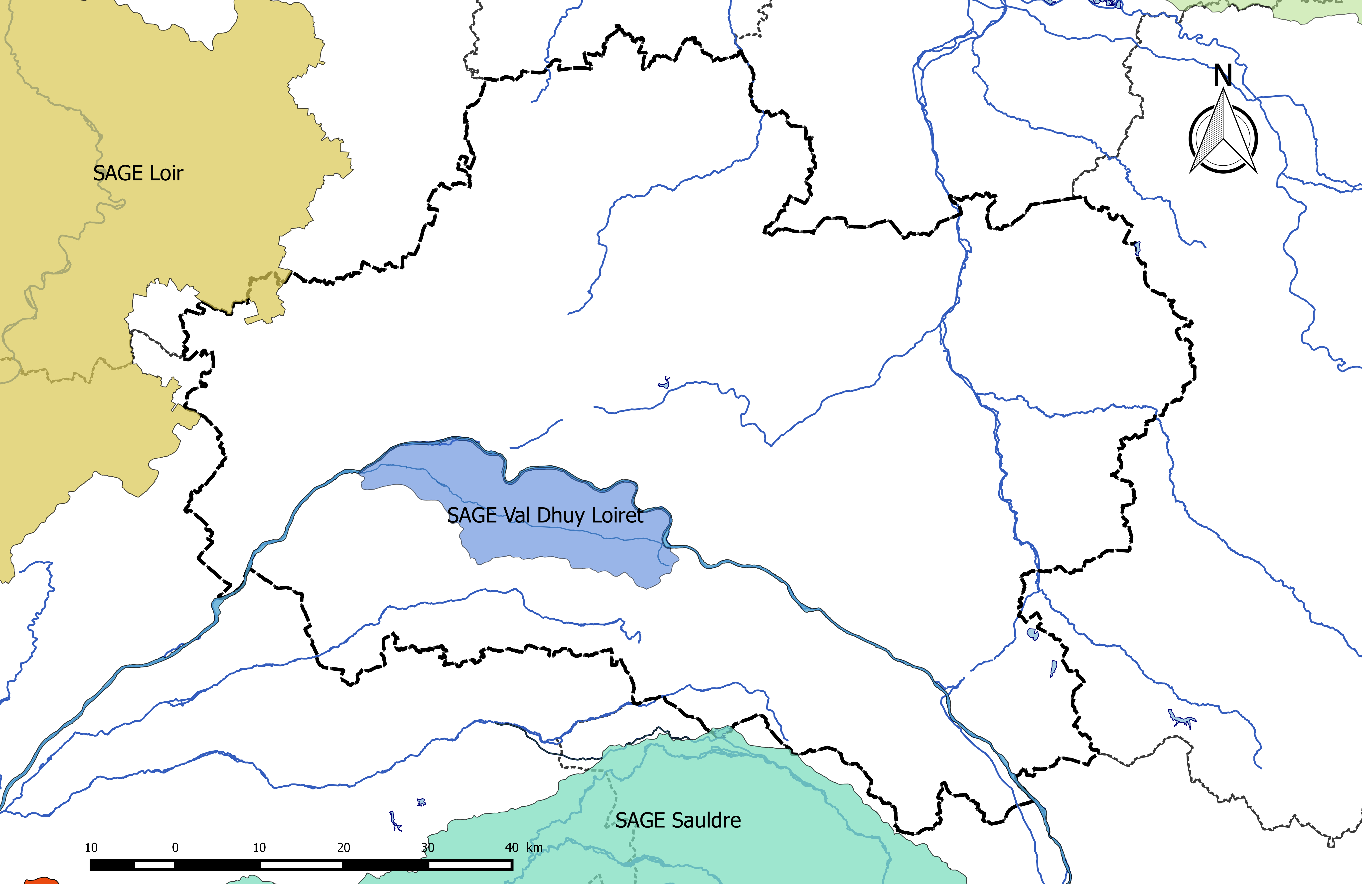 Carte des périmètres des schémas d'aménagement et de gestion des eaux (SAGE) approuvés ou prescrits dans le Loiret à la date du 15 août 2017.